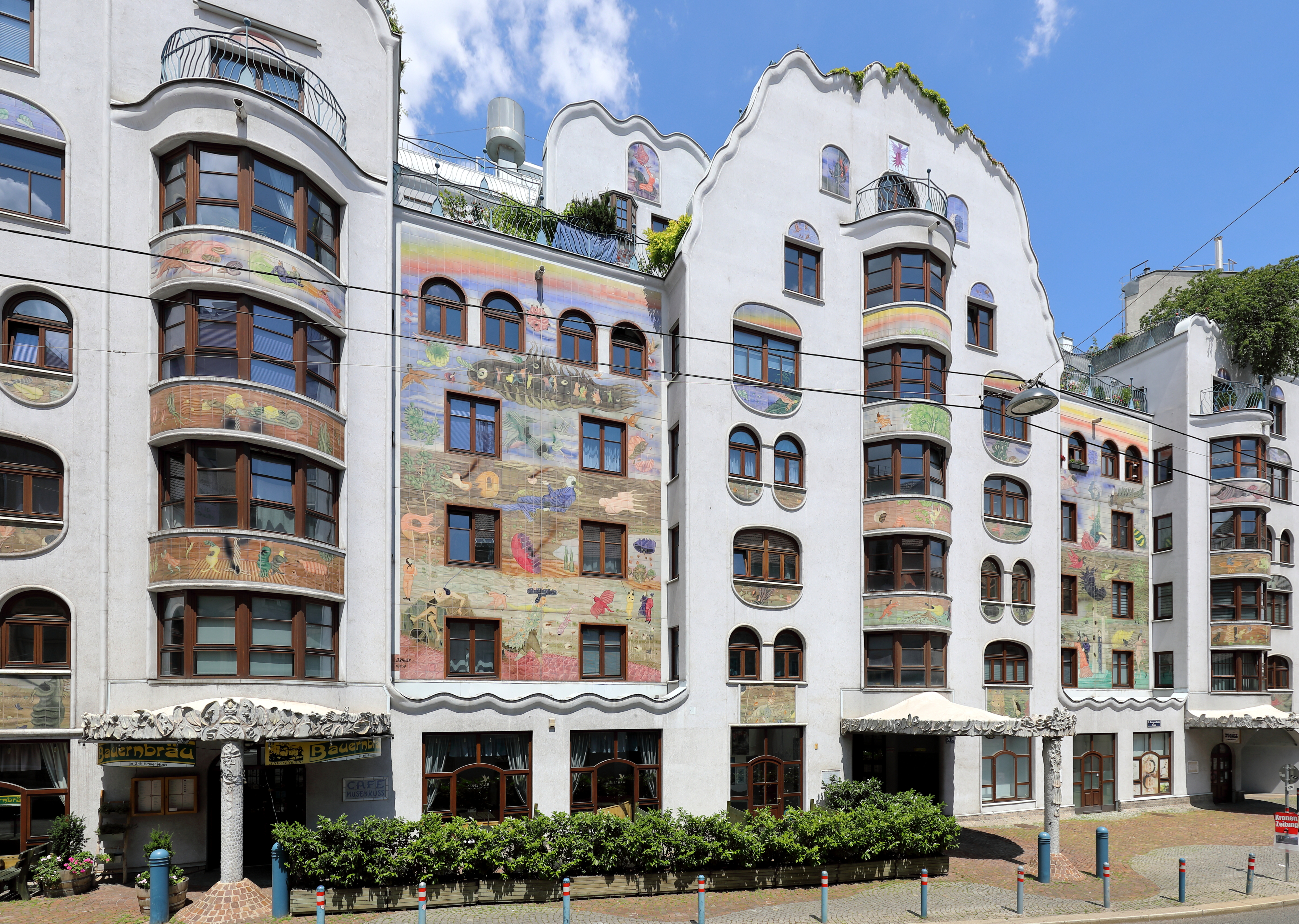 Das Arik-Brauer-Haus an der Adresse Gumpendorfer Straße 134-136 im 6. Wiener Gemeindebezirk Mariahilf.Das fünfstöckige Wohnhaus (33 Wohnungen, drei Geschäftslokale) wurde von dem Wiener Künstler Arik Brauer gestaltet - unter anderem mittels zwei großen Fliesenbildern an der Frontseite. Die Planung führte im Auftrag der MA 19 (Architektur und Stadtgestaltung) Peter Pelikan durch, der bereits mit Friedensreich Hundertwasser gearbeitet hatte. Das Modell wurde der Öffentlichkeit am 27. Jänner 1987 präsentiert, ab 1991 wurde das Haus errichtet und im April 1994 vom Bürgermeister Helmut Zilk eröffnet.